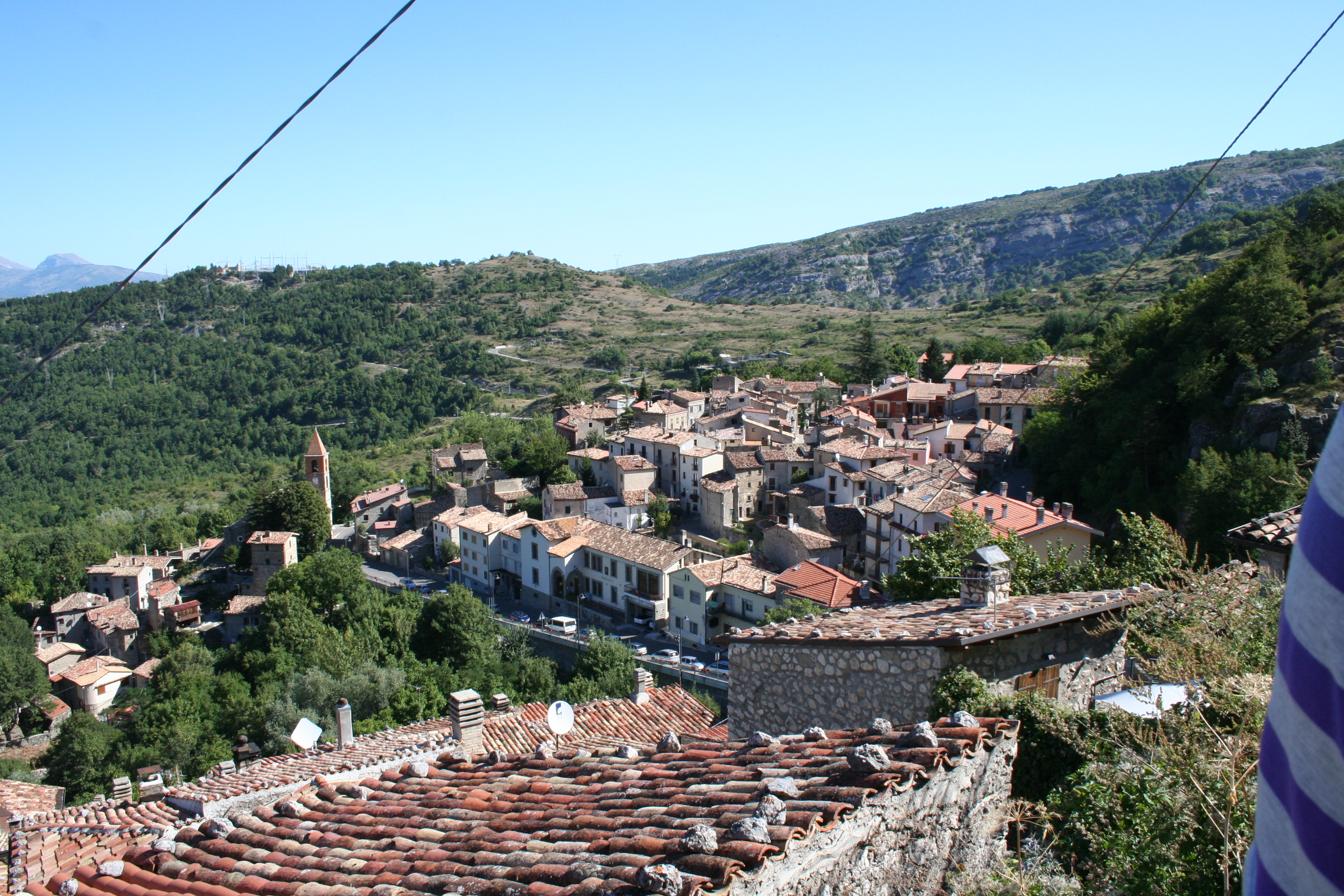 Panorama del borgo di Pietracamela in provincia di Teramo.